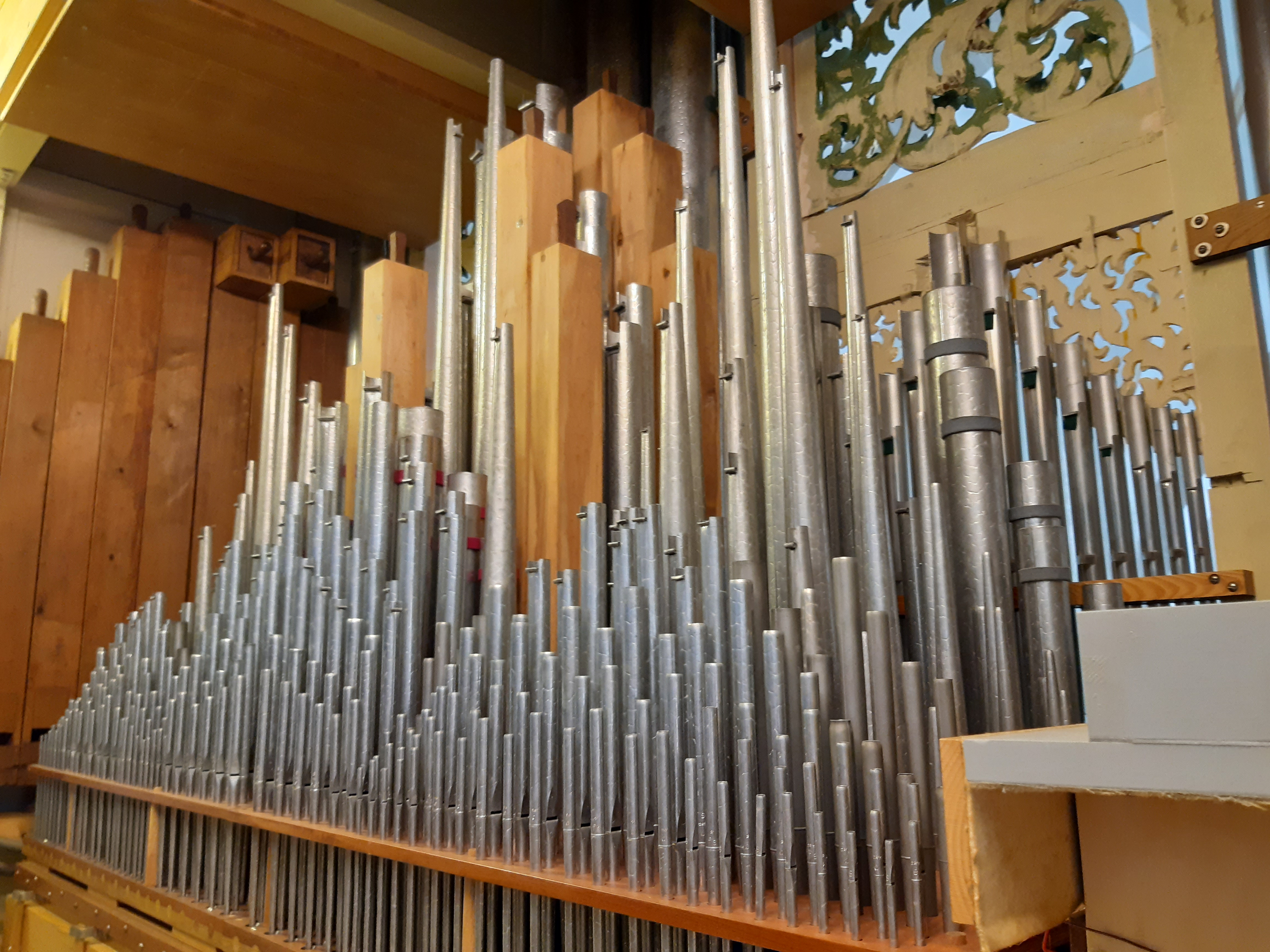 Teile des Hauptwerks direkt hinter dem Prospekt der Orgel